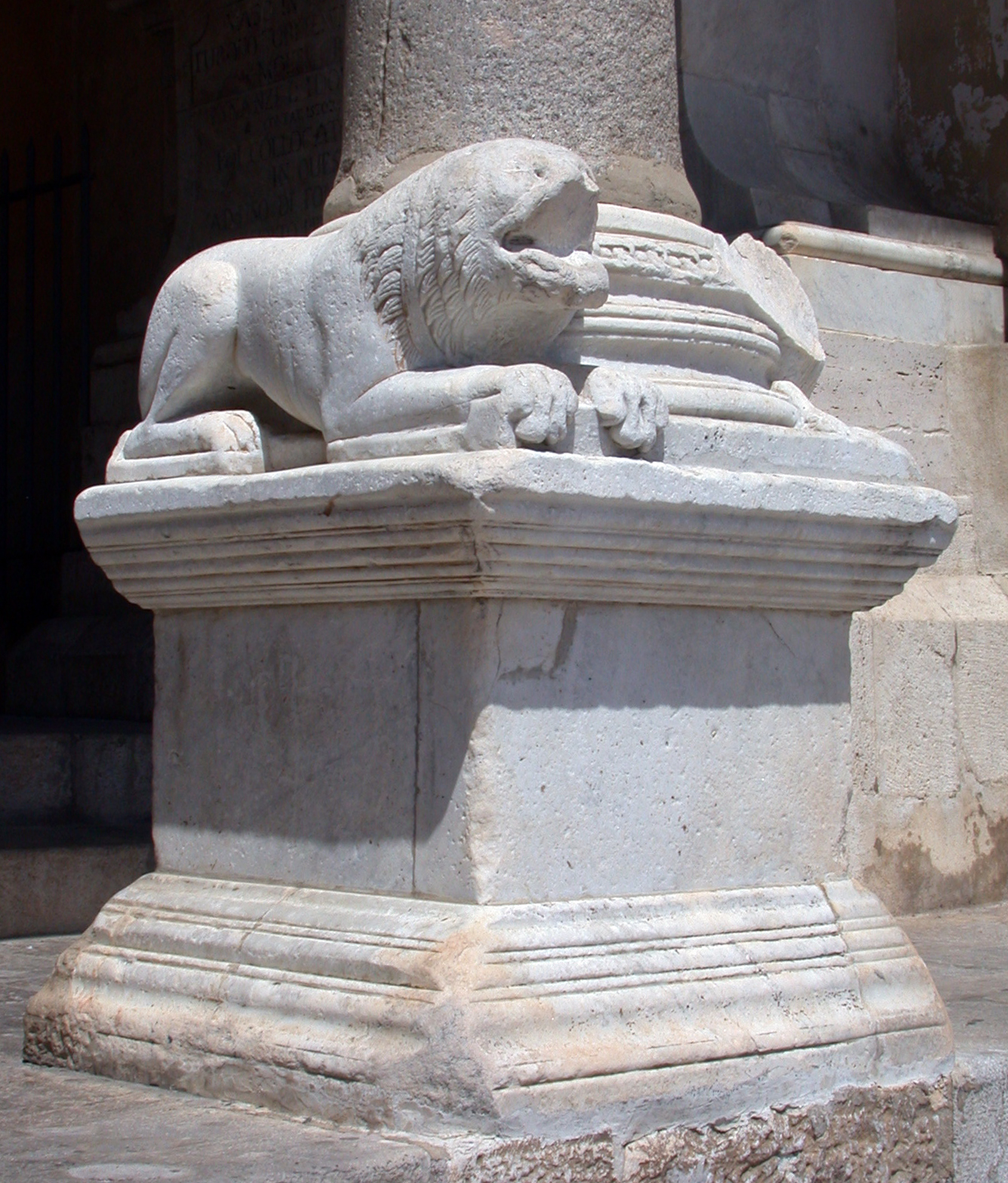 Terracina (provincia di Latina, Lazio, Italia), città alta, Duomo di San Cesareo, particolare della facciata (base di colonna con piedistallo decorata da leoni stilofori).